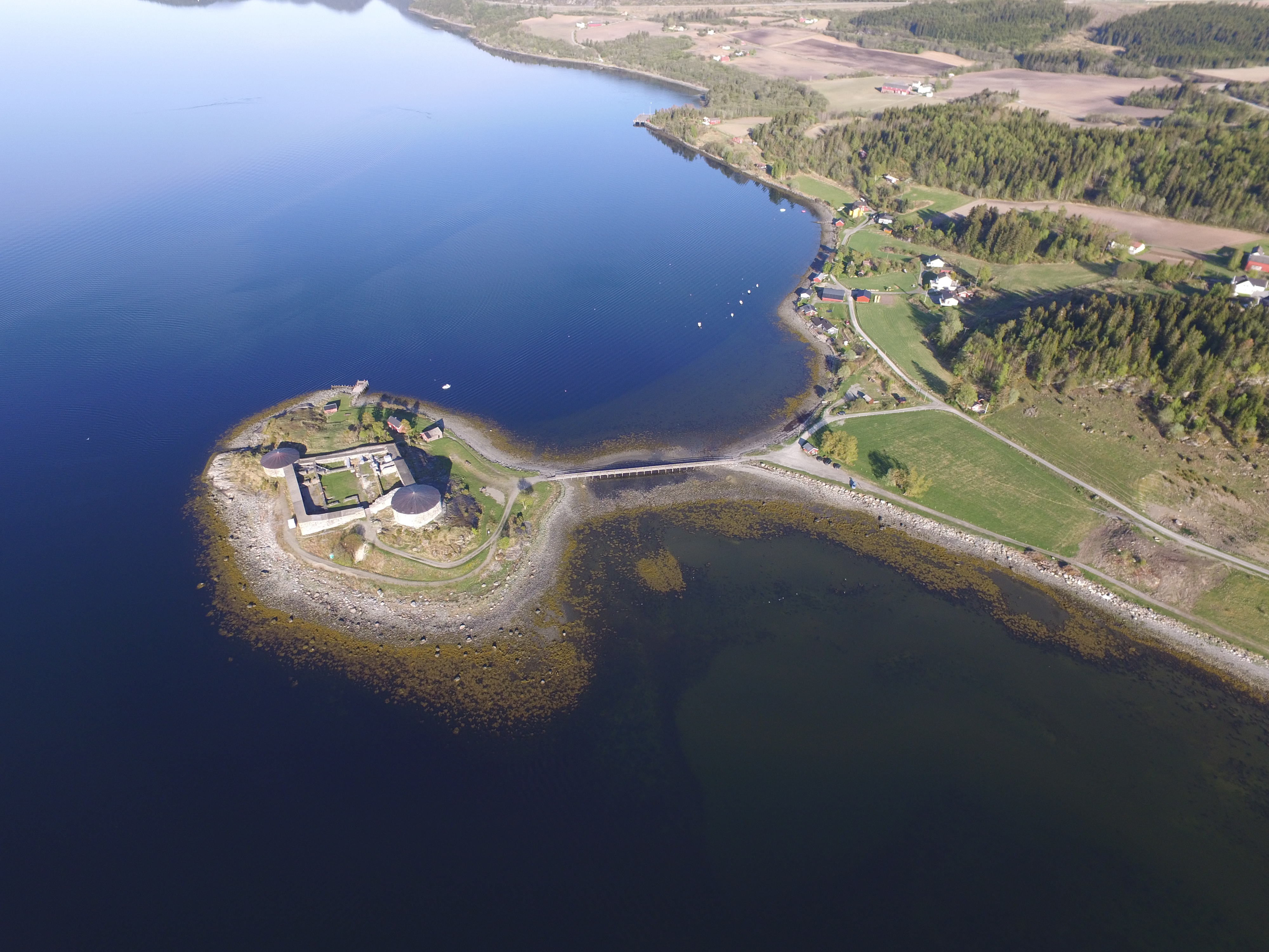 Dronefoto av Steinvikholmen slott